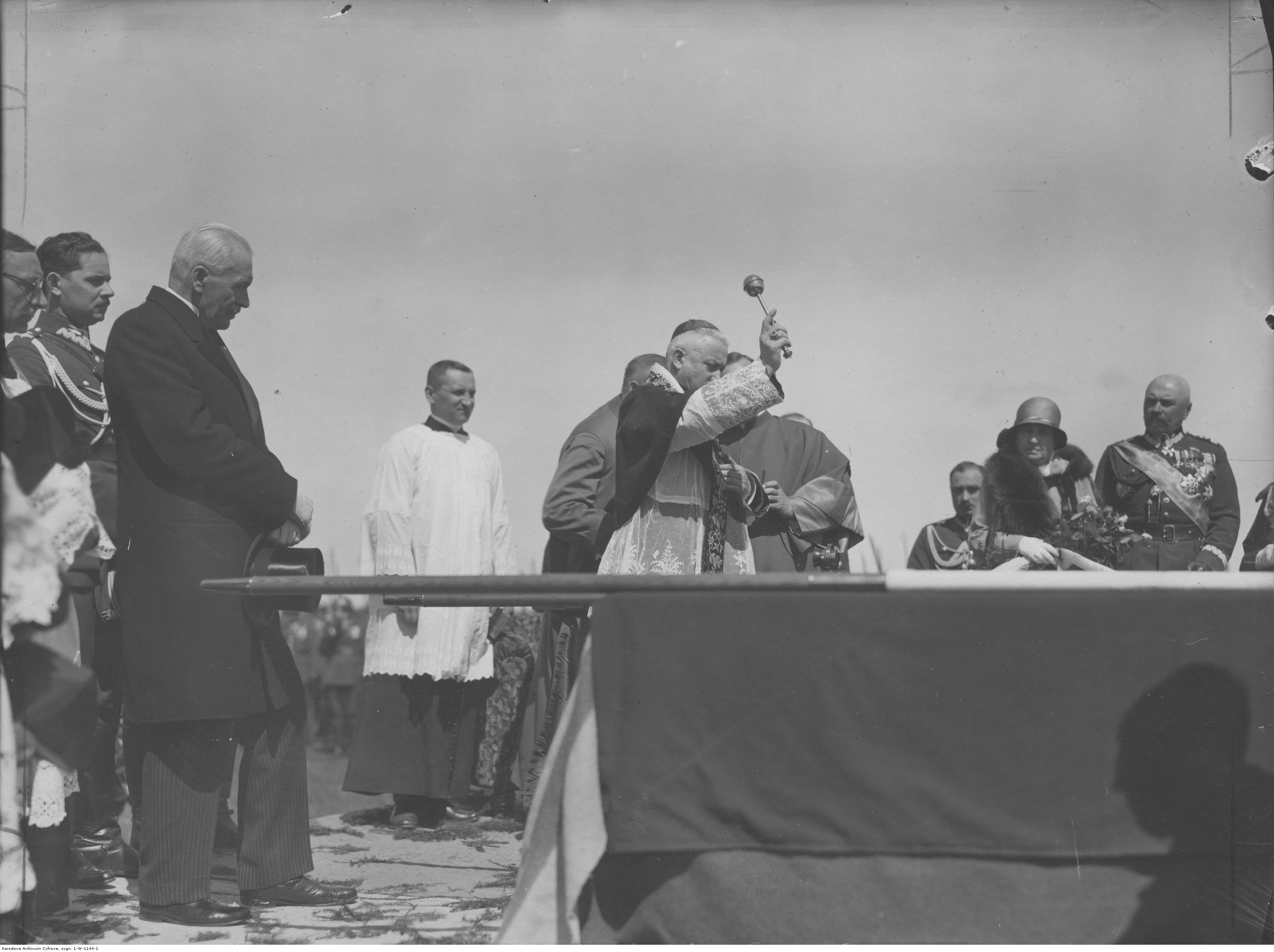 Święto 14 Dywizji Piechoty w Biedrusku. Prymas August Hlond dokonuje poświęcenia sztandarów. Z lewej prezydent RP Ignacy Mościcki. Od prawej: gen. Daniel Konarzewski, Michalina Mościcka oraz adiutanci prezydenta RP: mjr Kazimierz Jurgielewicz (za prezydentem) i kpt. Bolesław Suszyński (za Michaliną Mościcką). Koncern Ilustrowany Kurier Codzienny - Archiwum Ilustracji. Sygnatura: 1-W-1144-1